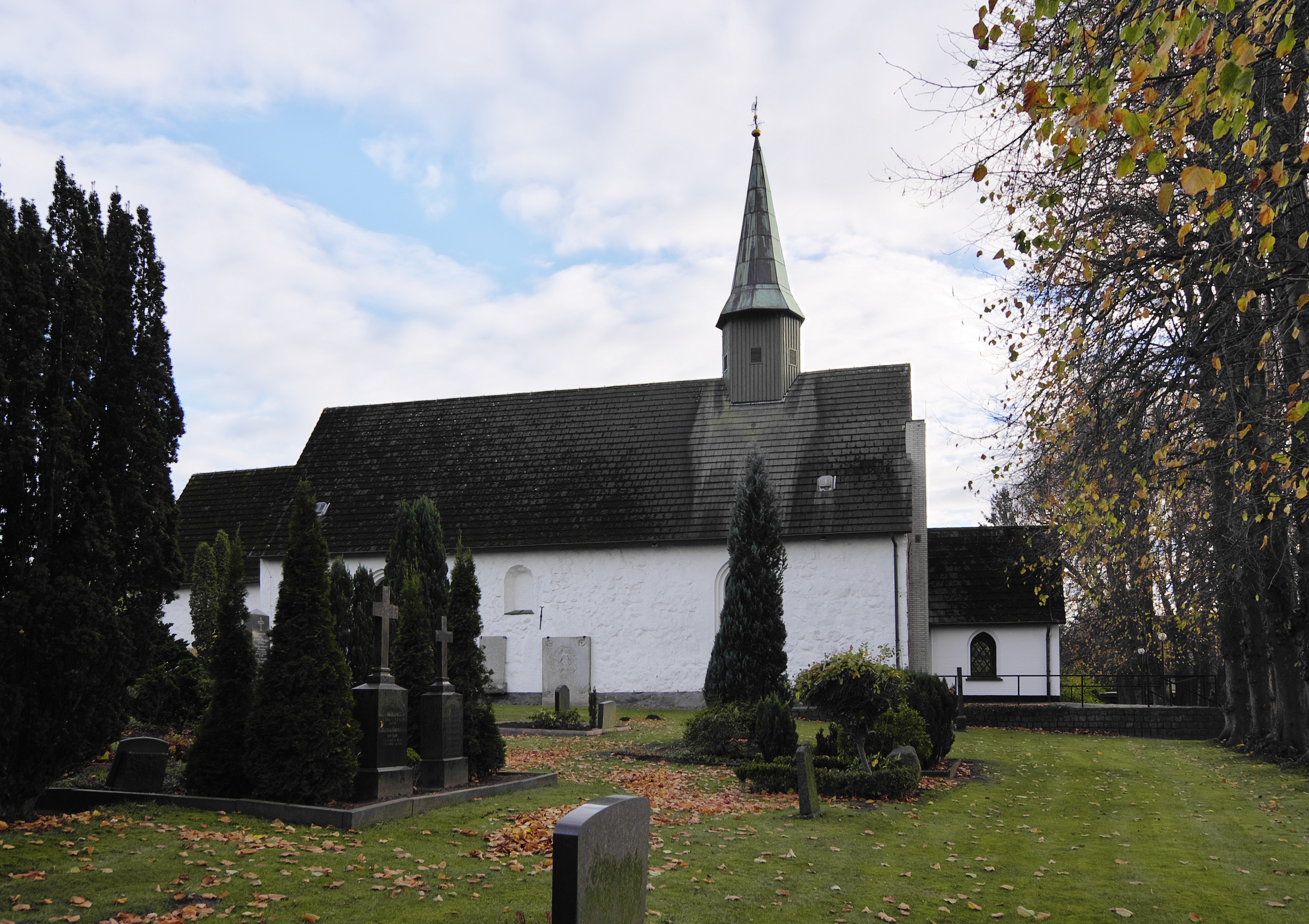 St. Marien in Tolk, Kreis Schleswig-Flensburg.